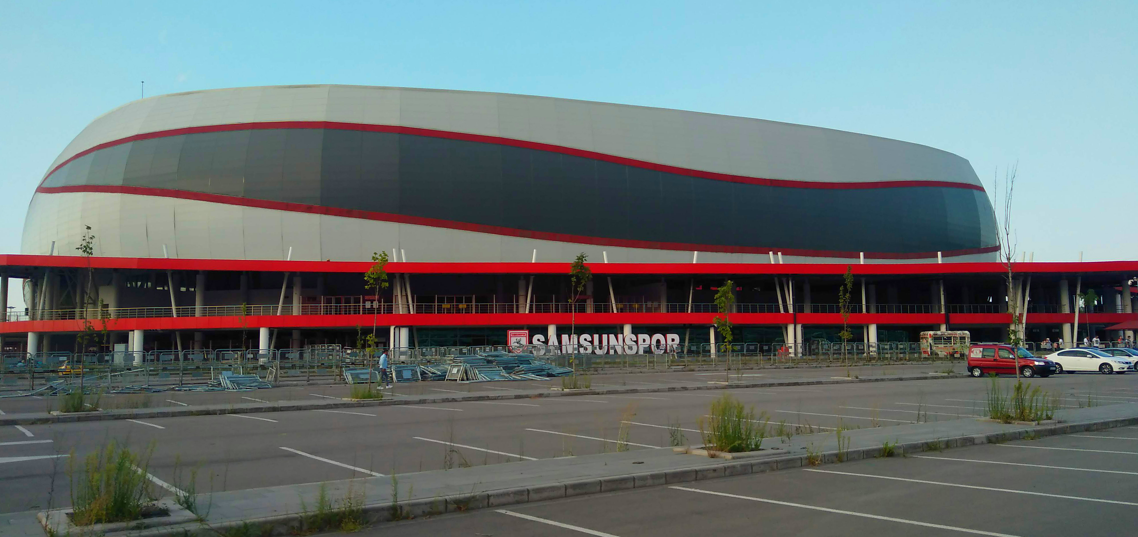 Samsun'un Tekkeköy ilçesinde bulunan 19 Mayıs Stadyumu'nun dış görünümü.